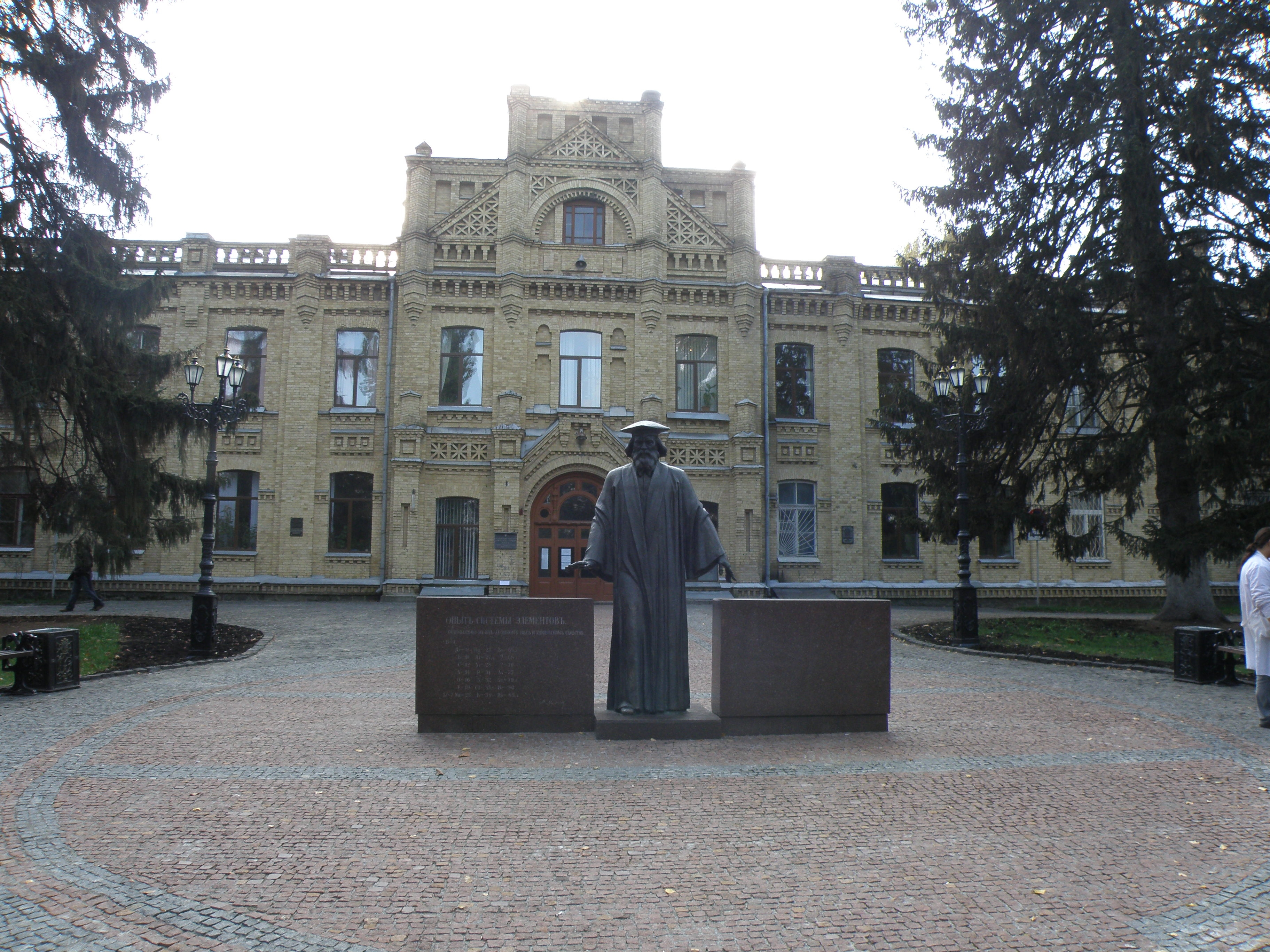 Пам'ятник Менделєєву на території КПІ, м.Київ